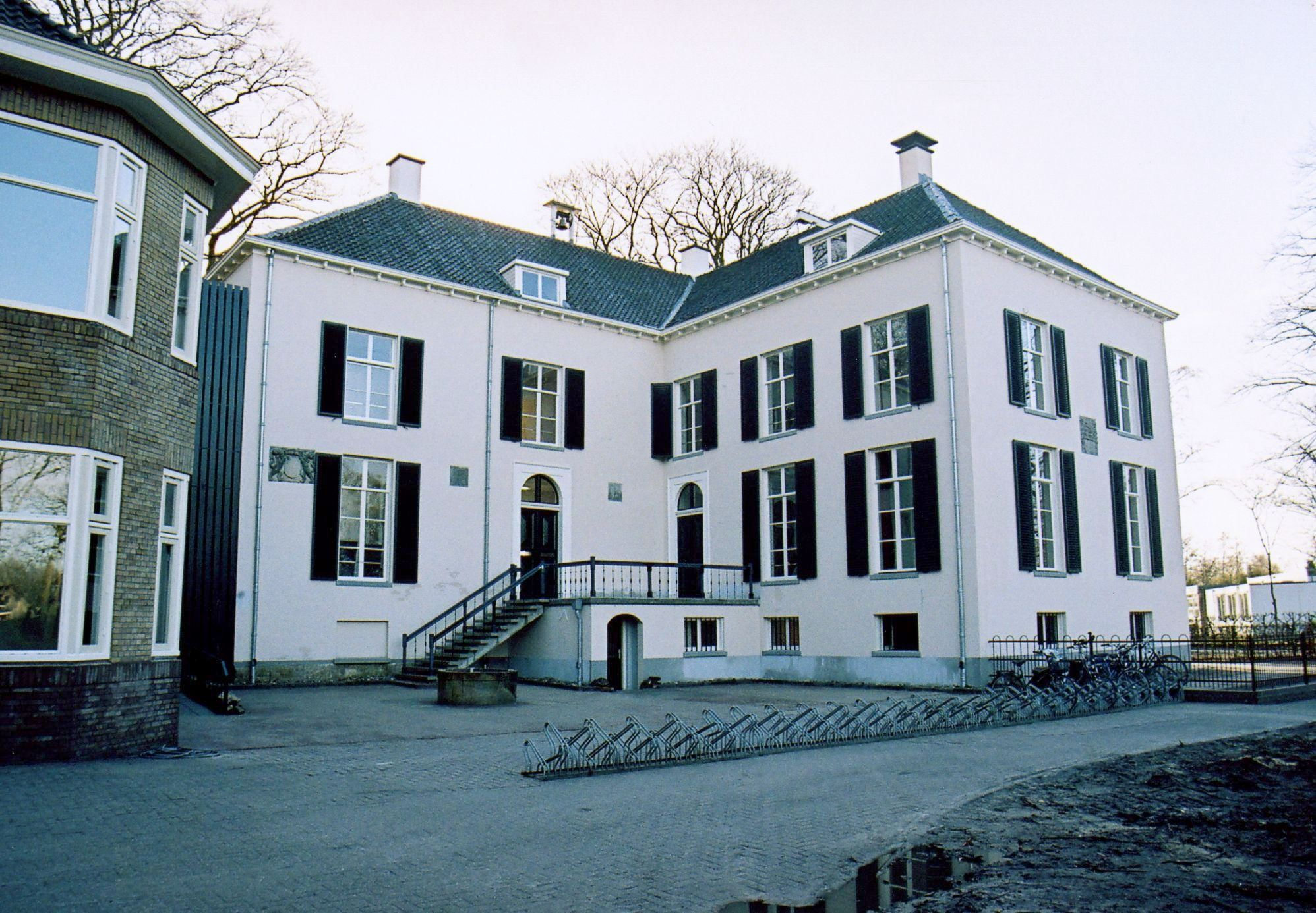 Huize Heeckeren te Goor.